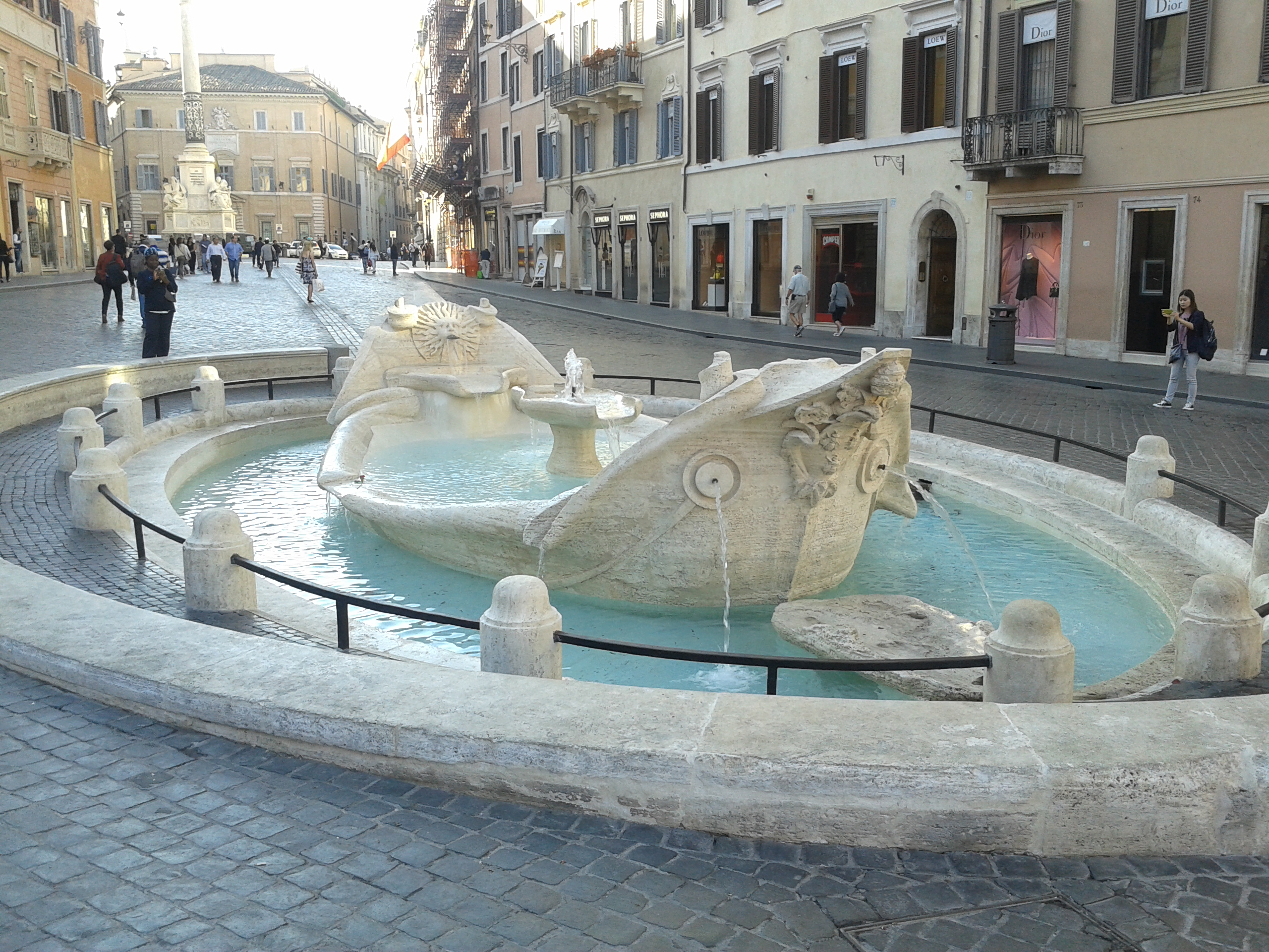 La fontana della Barcaccia subito dopo il restauro del 2014, guardando verso l'adiacente Piazza Mignanelli